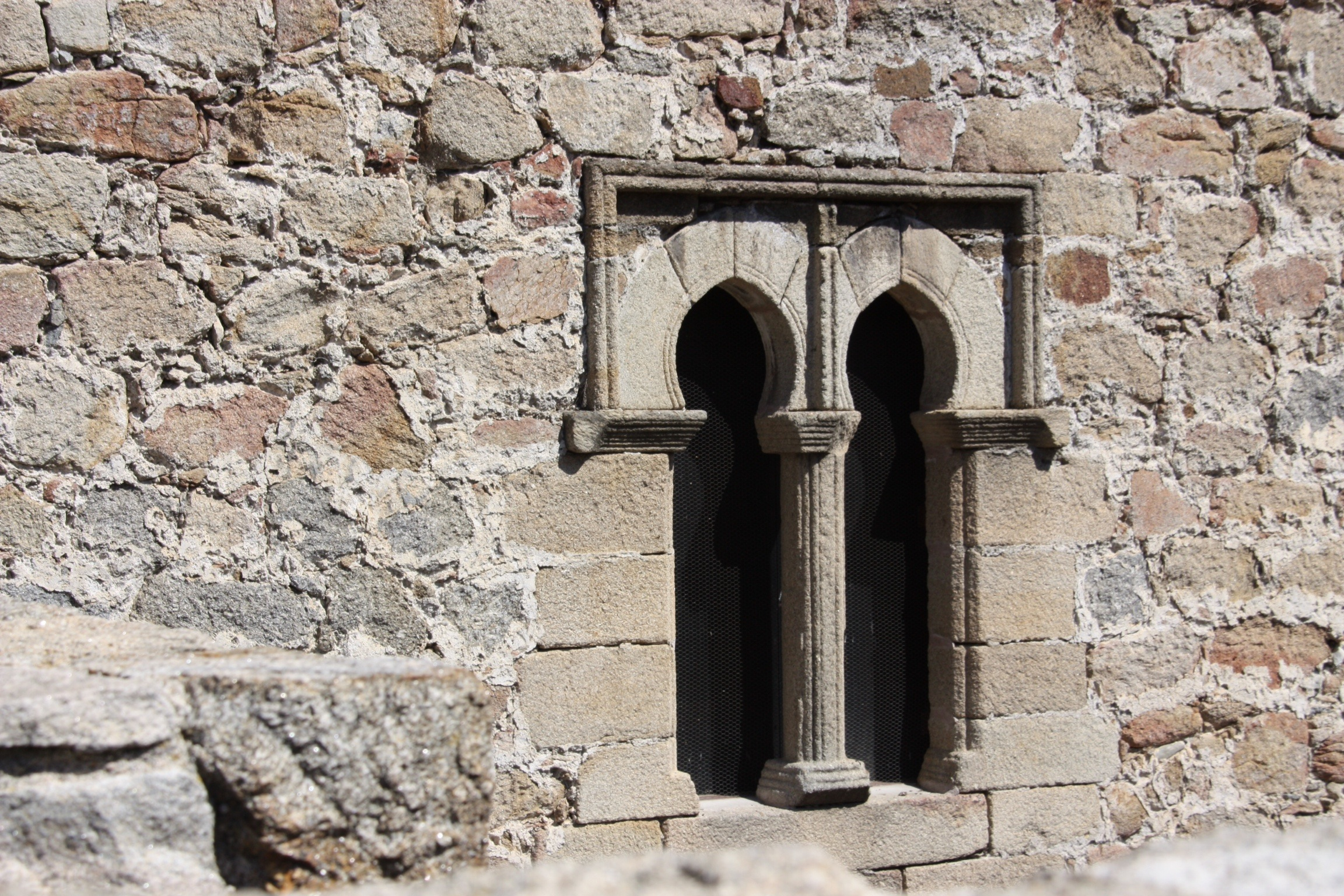 Detalle de una ventana de Castillo de Arenas de San Pedro o de la Triste Condesa S.XV